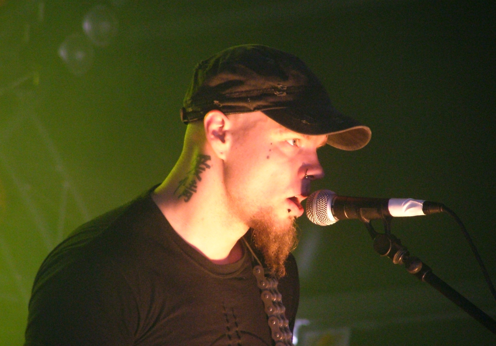 Finnische Dark-Metal-Band Before the Dawn beim Tuska Open Air 2008